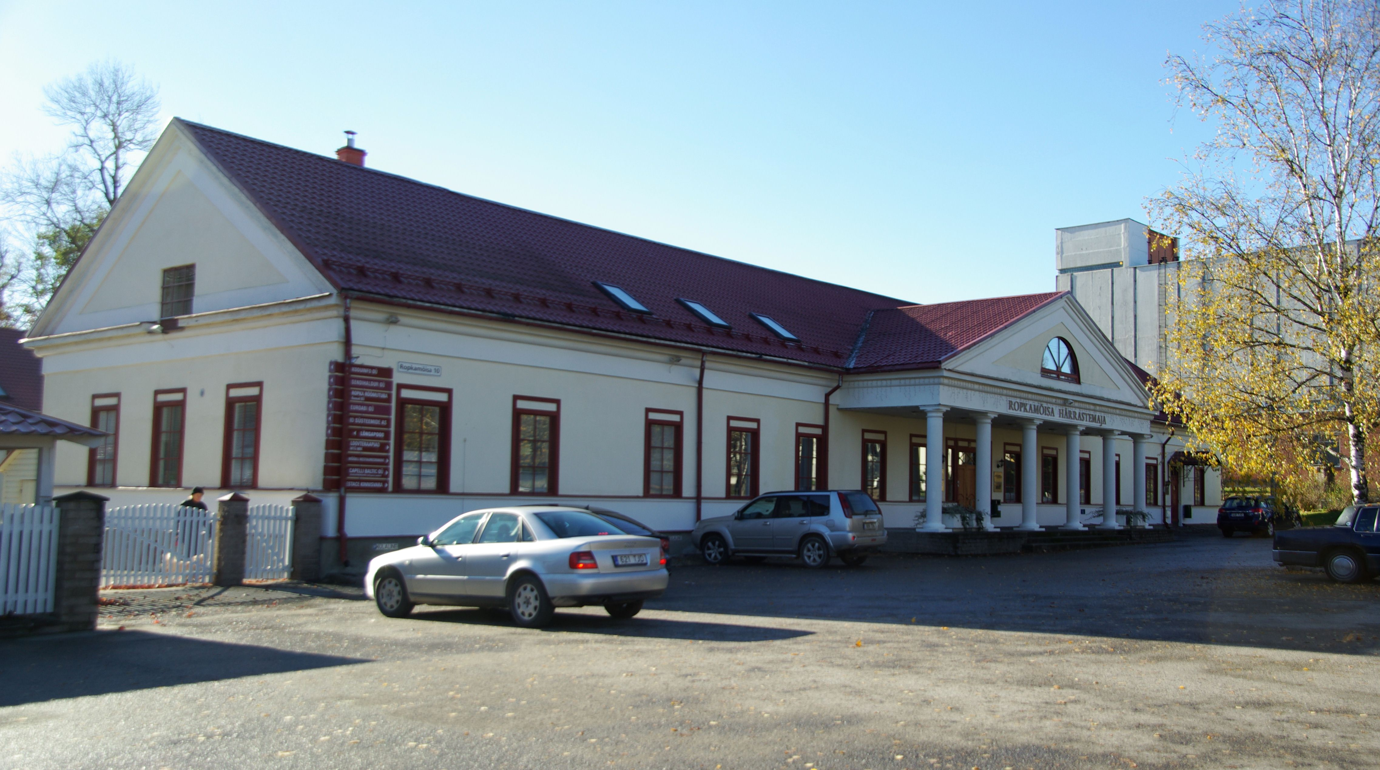 Tartu,Tähe tänava ja Aardla tänava rist